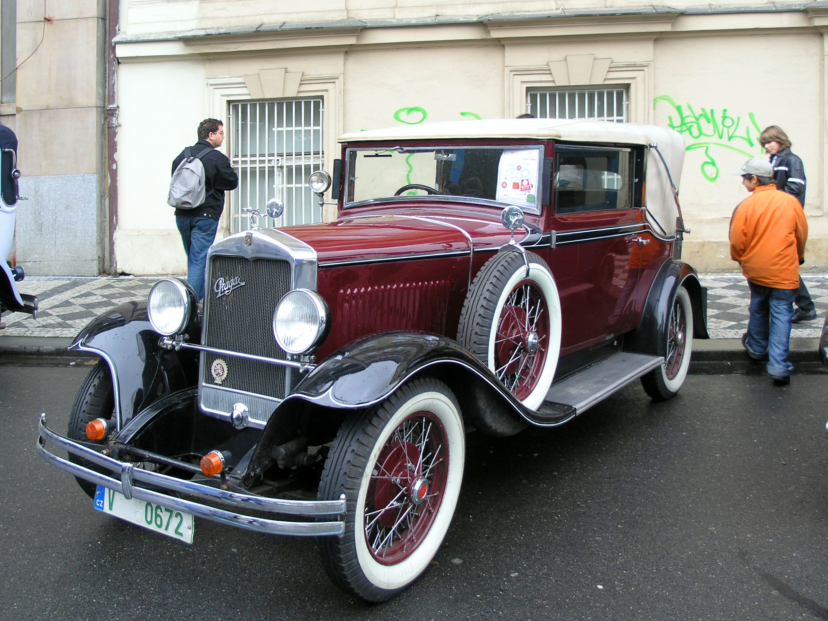 Vůz Praga Alfa (1931) účastnící se jízdy veteránů u příležitosti 90. výročí vzniku samostatného Československa, 28. října 2008